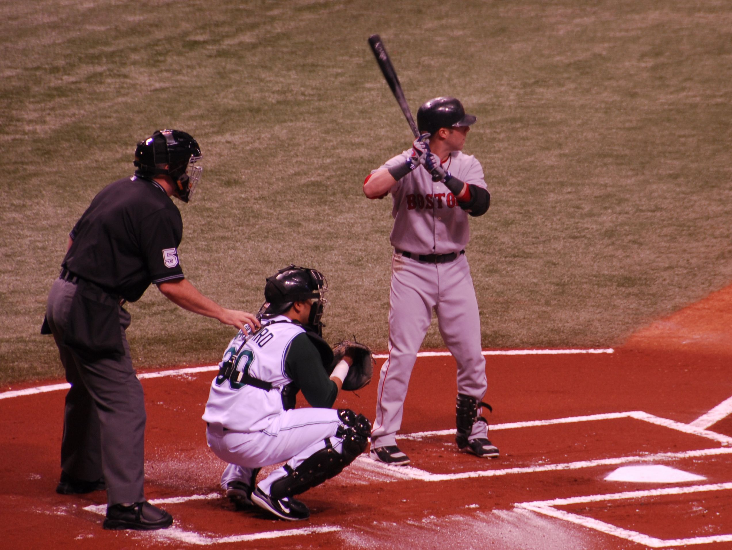 Dustin Pedroia